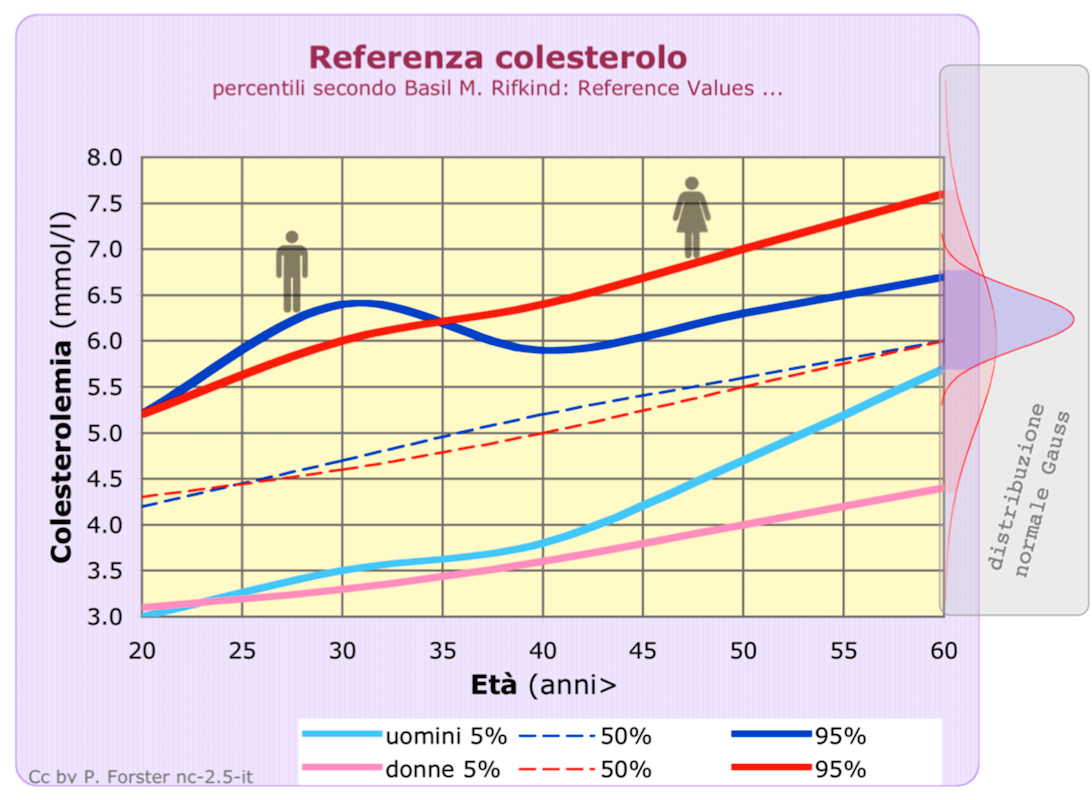 Referenze di colesterolemia USA secondo età e sesso